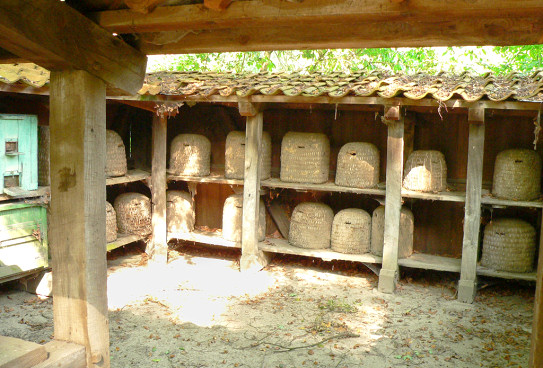 Bienenzaun im Freilichtmuseum Heidemuseum Walsrode, Genehmigung des Museumsbetreibers für die Veröffentlichung der Innenaufnahme vom Gelände in Wikipedia in CC-Lizens liegt mir als Mail vom 6.10.06 vor. Beehives at the Walsrode Heath Museum, Lower Saxony, Germany. Permission of the museum operator granted for the publication of the photographs taken within the site of the museum iaw CC licence as per email of 6.10.06.